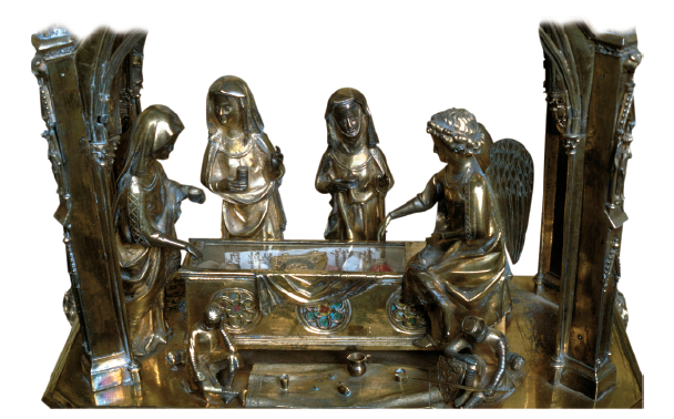 Ilobi santuko erlikia ontzia, Iruñea